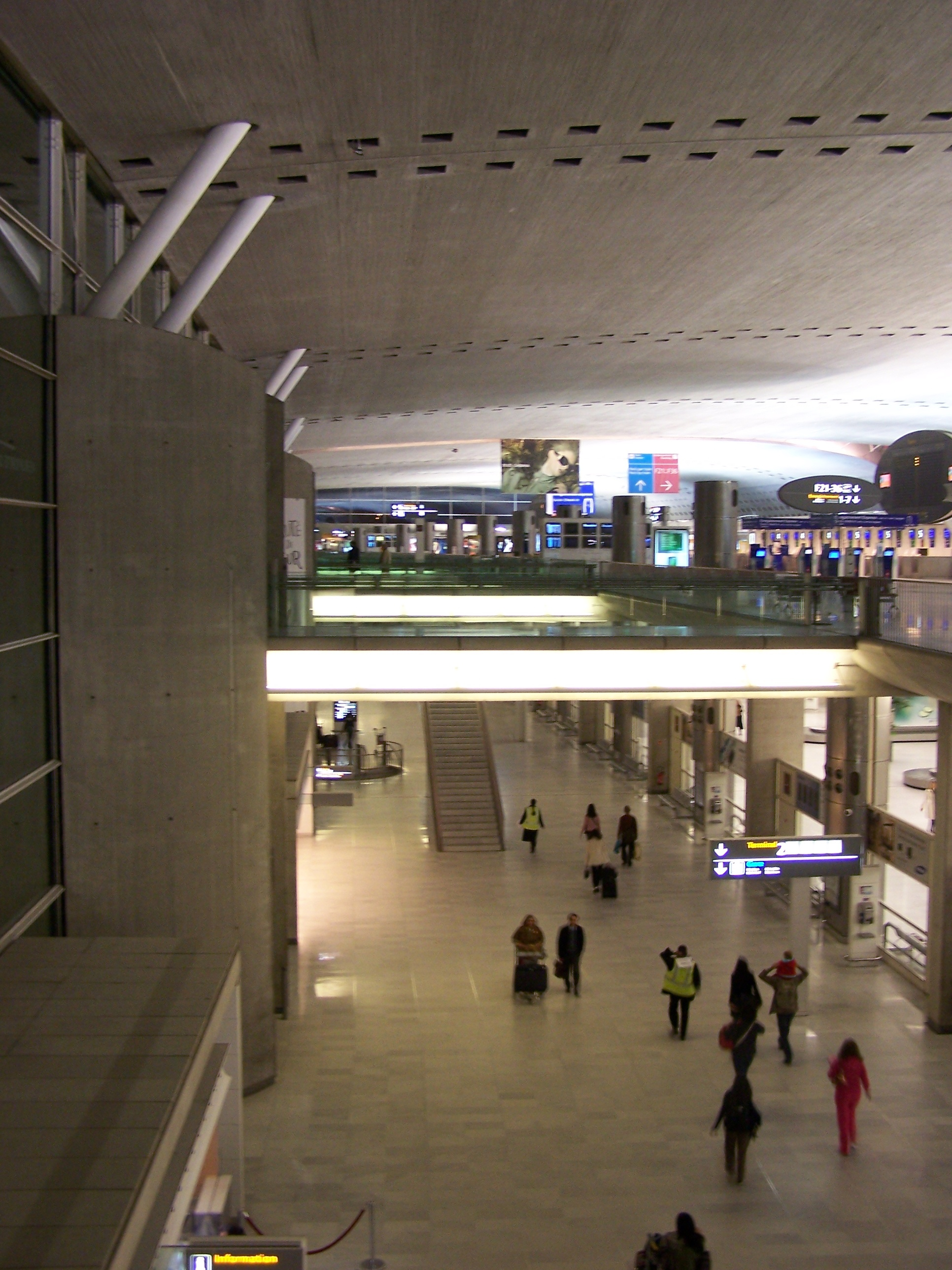 Terminal 2F vue interieur